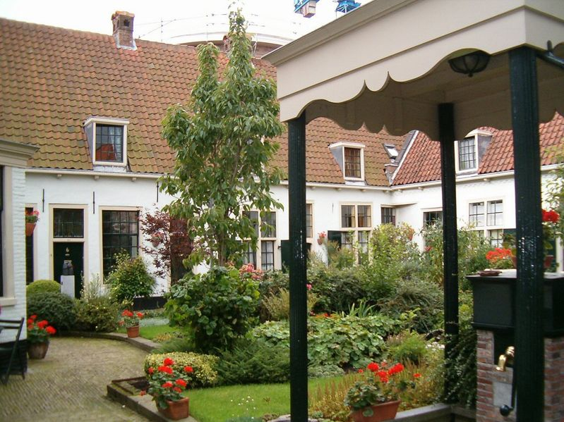 Inside the Bakenesserhofje, Haarlem, Netherlands